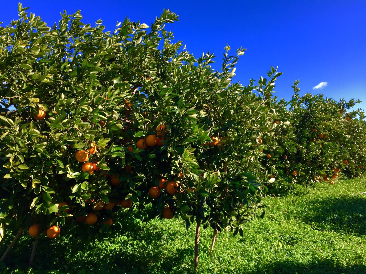 Naranjos en Petrés